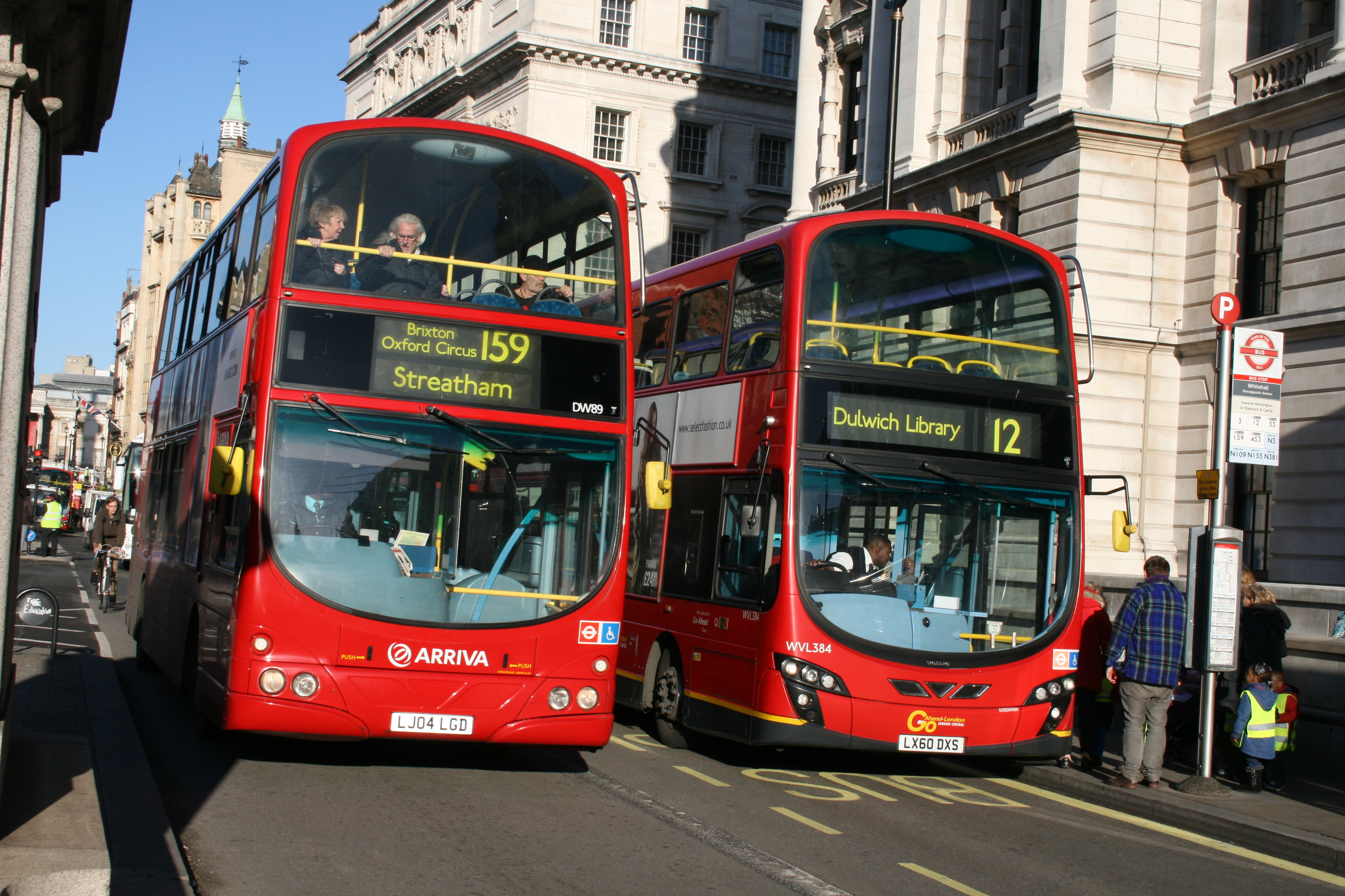 LJ04 LGD, LX60 DXS